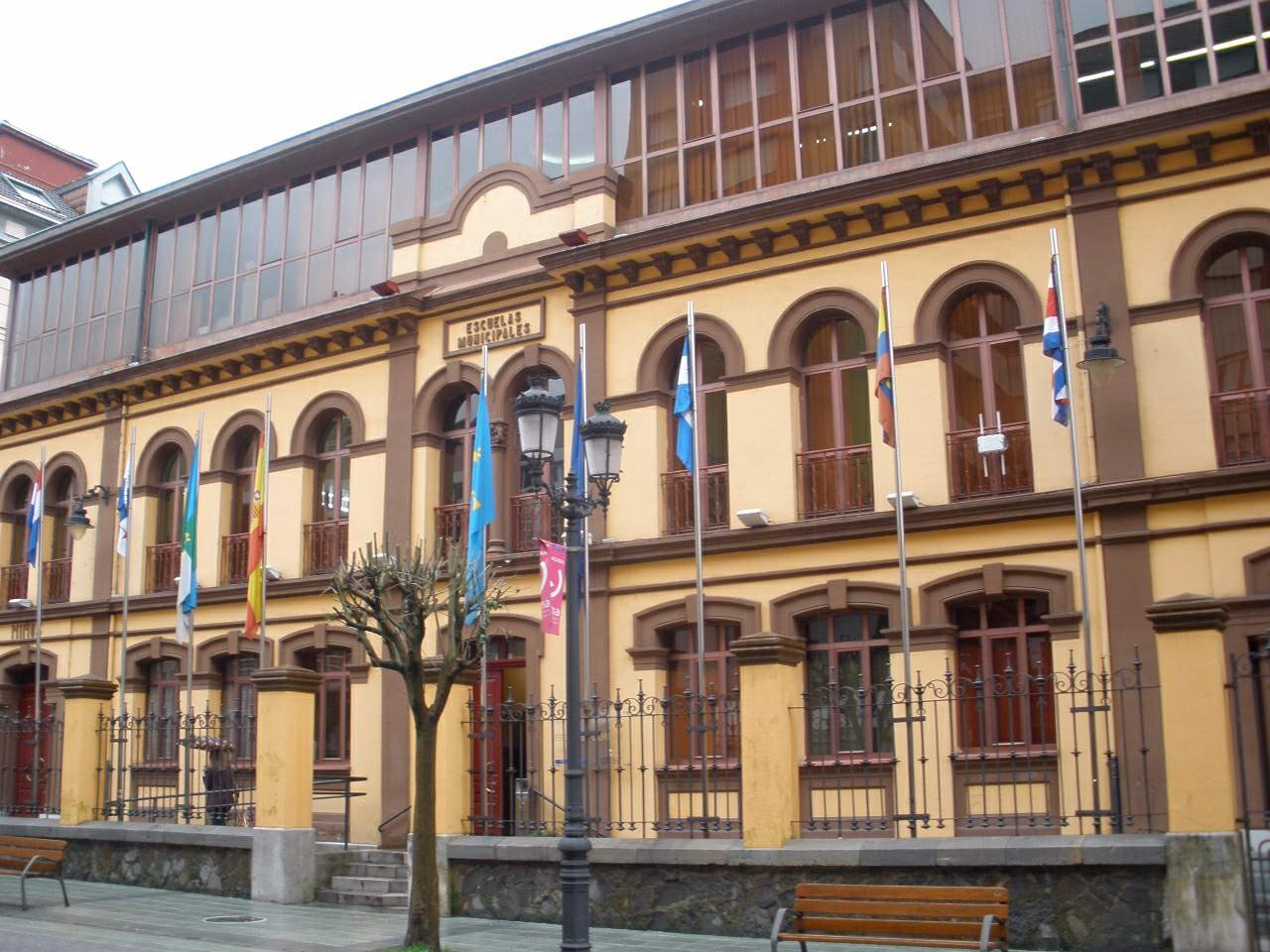 Sama (Langreo) - Centro Cultural Municipal 'Escueles Dorado'